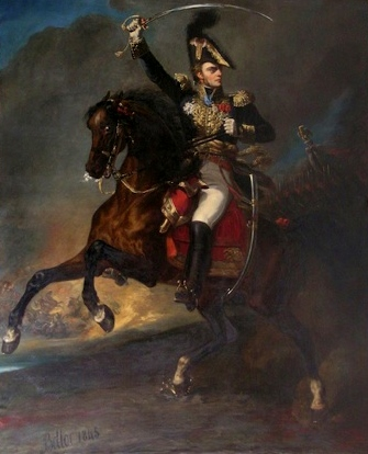 Le général Habert à cheval.